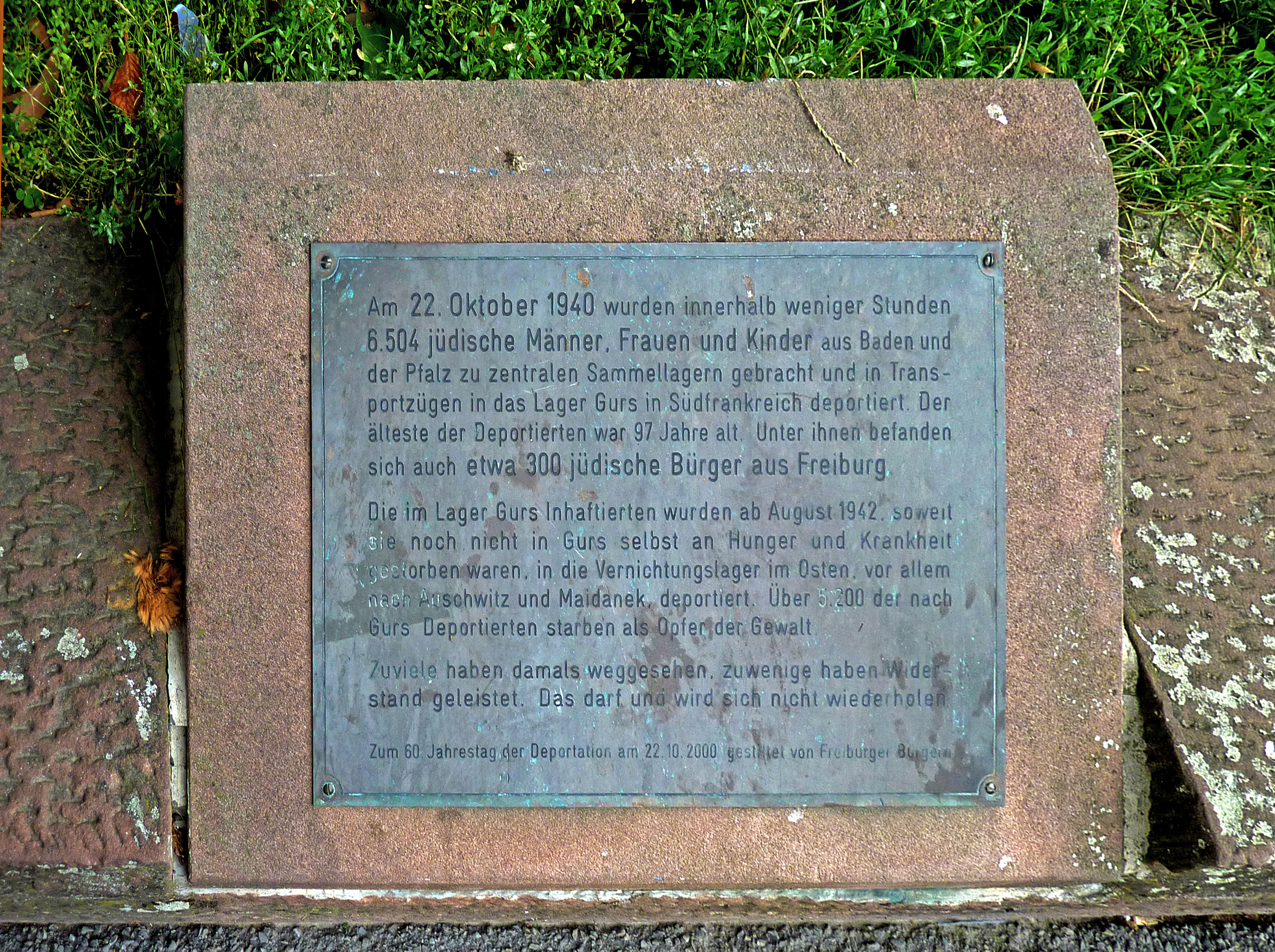 Gedenktafel am Freiburger Platz der alten Synagoge für die durch die sog. Wagner-Bürckel-Aktion deportierten Juden von Baden und der Pfalz. Inschrift: "Am 22. Oktober 1940 wurden innerhalb weniger Stunden 6.504 jüdische Männer, Frauen und Kinder aus Baden und der Pfalz zu zentralen Sammellagern gebracht und in Transportzügen in das Lager Gurs in Südfrankreich deportiert. Der älteste der Deportierten war 97 Jahre alt. Unter ihnen befanden sich auch etwa 300 jüdische Bürger aus Freiburg. Die im Lager Gurs Inhaftierten wurden ab August 1942, soweit sie noch nicht in Gurs selbst an Hunger und Krankheit gestorben waren, in die Vernichtungslager im Osten, vor allem nach Auschwitz und Maidanek, deportiert. Über 5.200 der nach Gurs Deportierten starben als Opfer der Gewalt. Zuviele haben damals weggesehen, zuwenige haben Widerstand geleistet. Das darf und wird sich nicht wiederholen. Zum 60. Jahrestag der Deportation am 22. 10. 2000 gestiftet von Freiburger Bürgern"